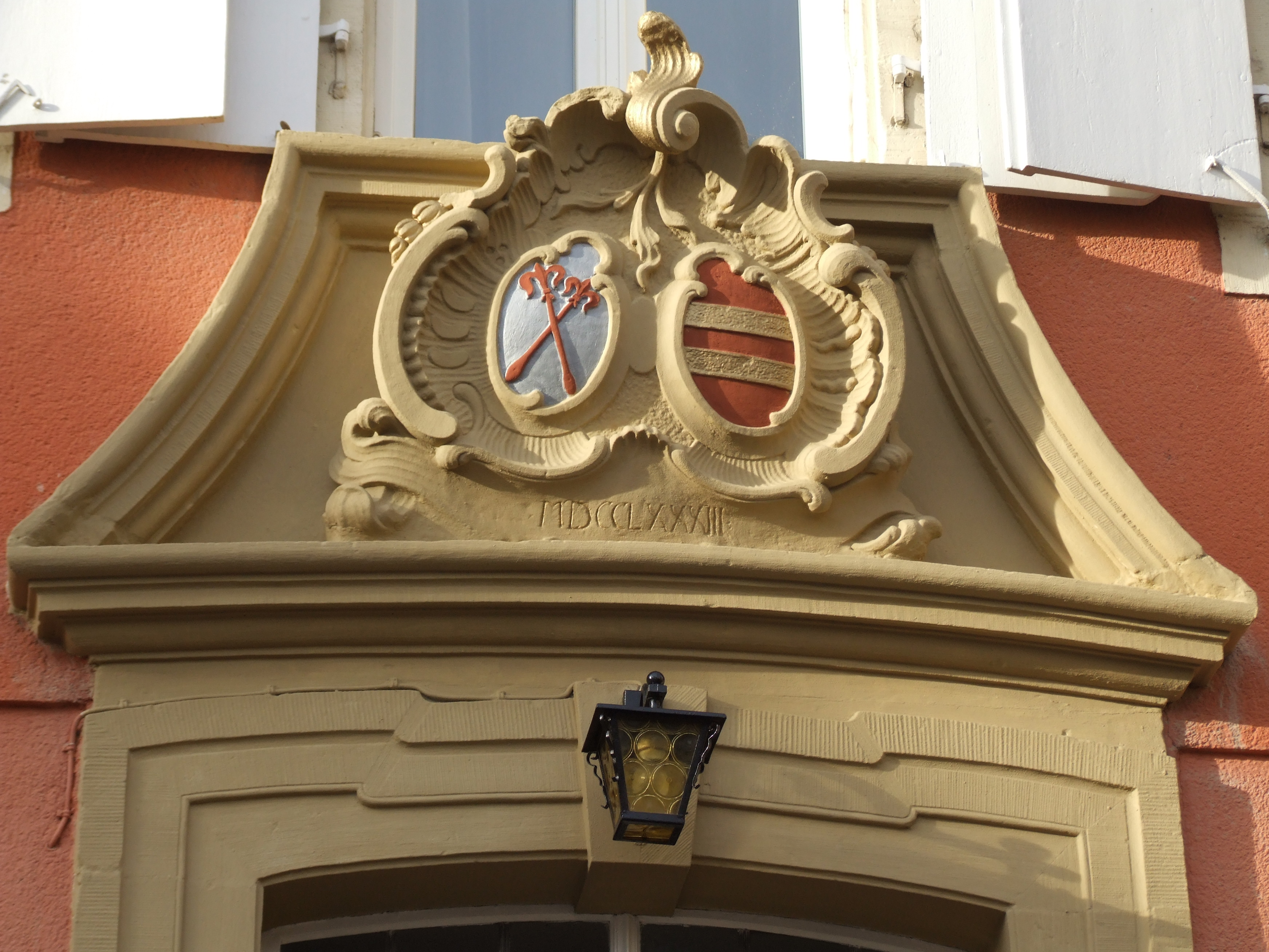 Altes Pfarrhaus in Eschelbronn mit dem Wappen der Familie von Venningen